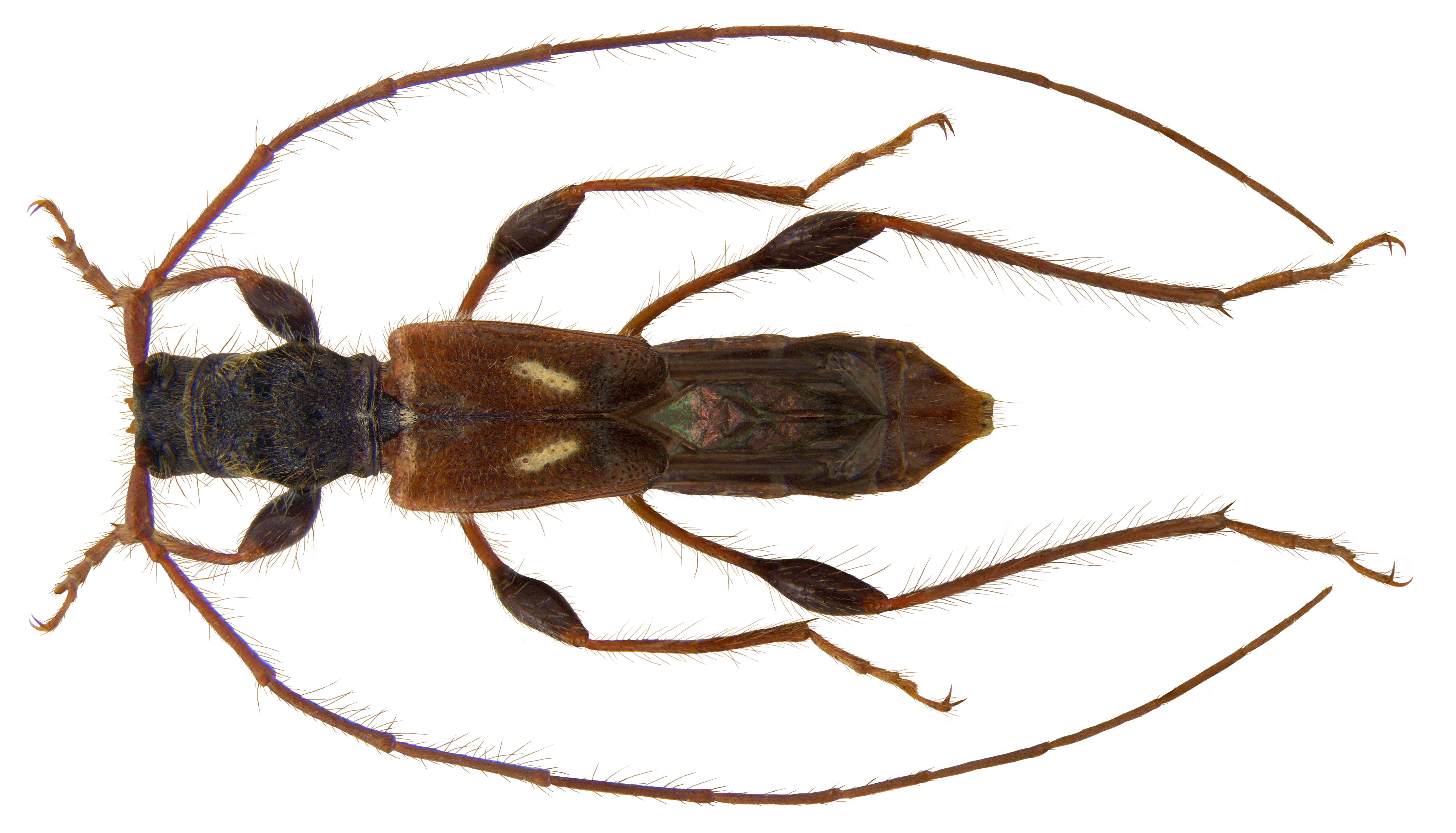 Familie: Cerambycidae Grösse: 6-16 mm Verbreitung: Europa Ökologie: Entwicklung in Nadelholz, selten in Laubholz Fundort: Germania, Bayern, Oberfranken, Selbitz leg.det. U.Schmidt, 2005 Foto: U.Schmidt, 2007